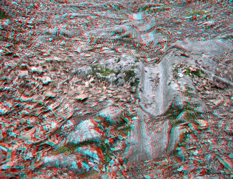 Szekérnyom a kövekben - Szádvár - Szögliget - Hungary - Europe